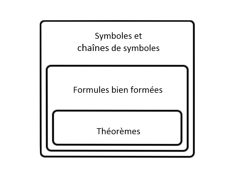 Traduction de l'image 'Formal languages' : un diagramme montrant les divisions syntaxiques au sein d'un système formel. Les chaînes de symboles peuvent être largement divisés en formules bien formées.L'ensemble des formules bien formées est divisé en théorèmes et non-théorèmes.